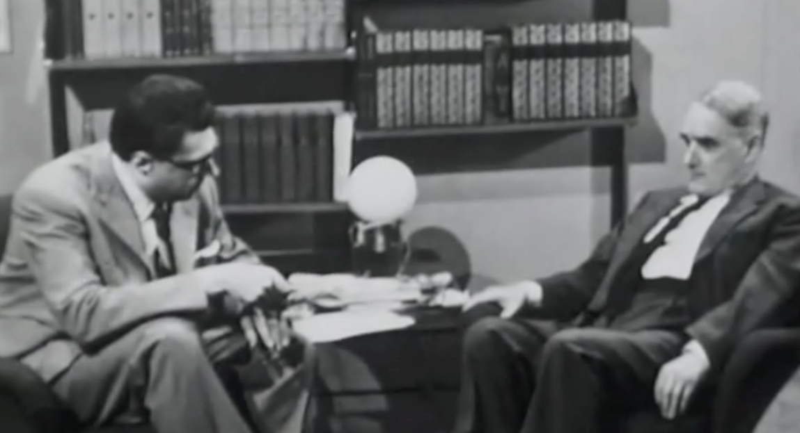 Lo scrittore Bruce Marshall, intervistato da Luigi Silori a Roma nel 1959